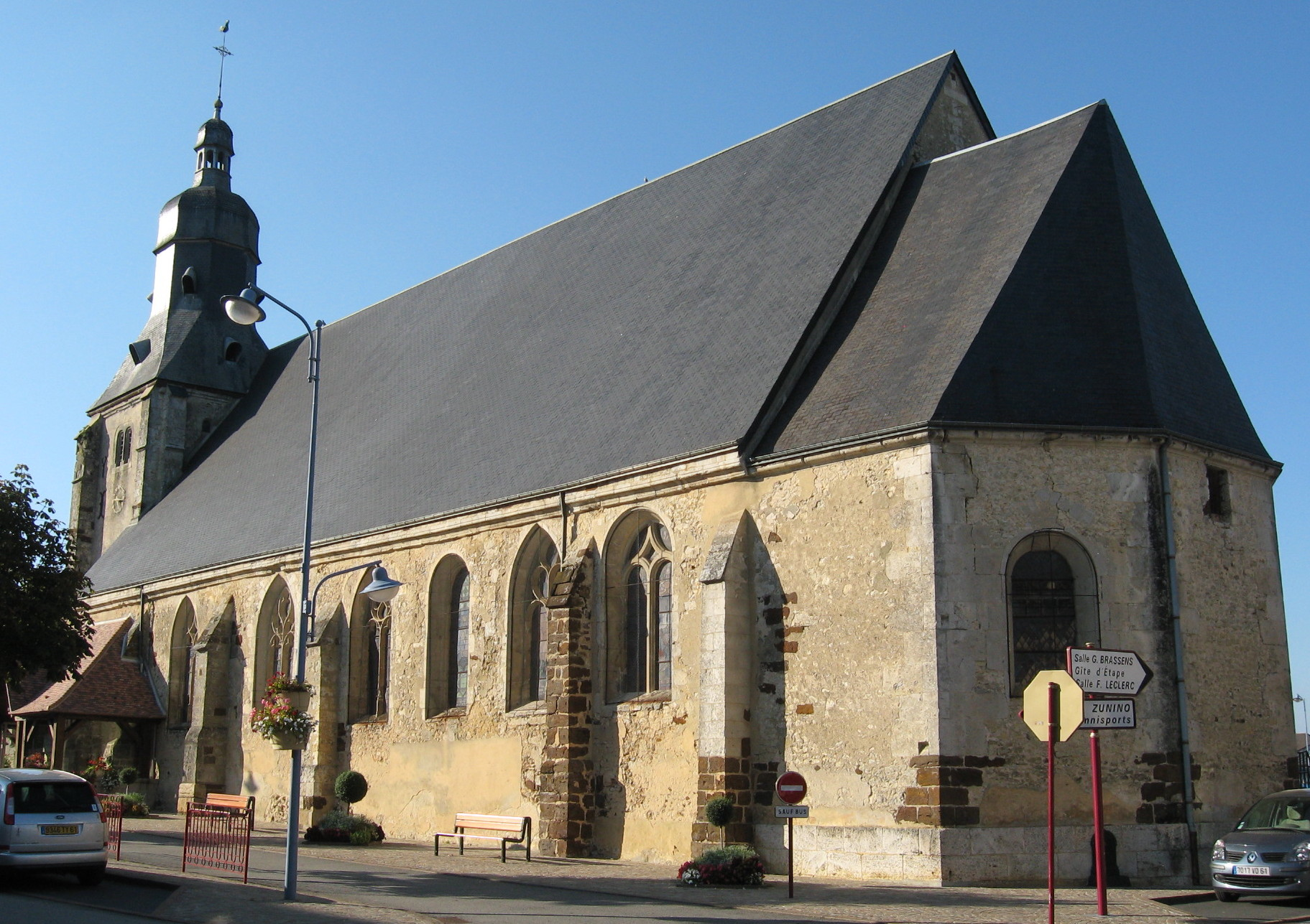 Vue du sud est. Nef 12e s. Abside et baies modifiées au 15e s.ISMH 1991. .